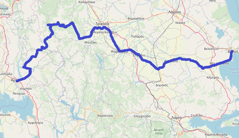 Ο χάρτης της Εθνικής Οδού 30 This map may be incomplete, and may contain errors. Don't rely solely on it for navigation.